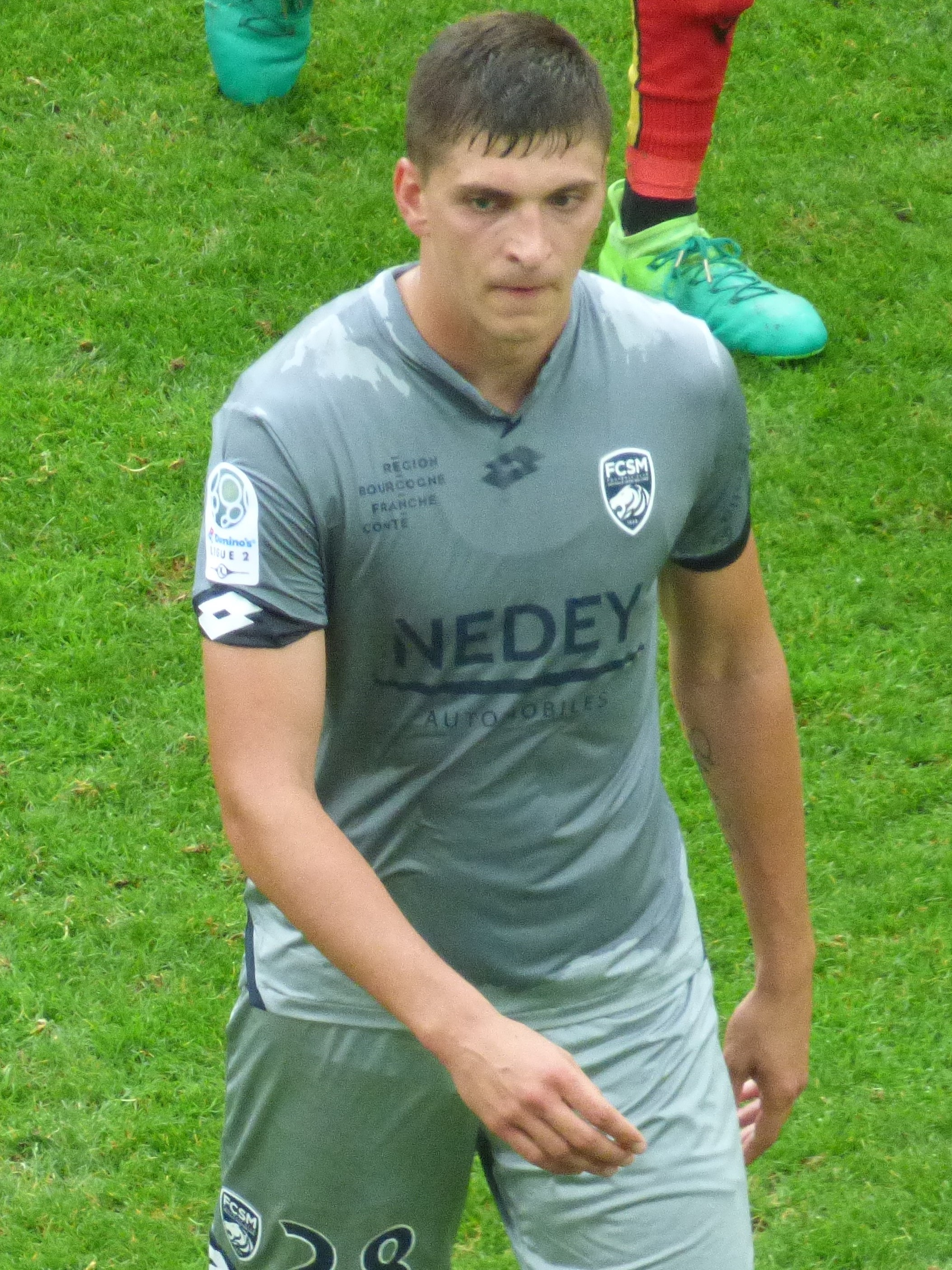 Pylyp Budkivskyi lors du match Lens / Sochaux, comptant pour la septième journée du championnat de France de football de Ligue 2, le 15 septembre 2018.